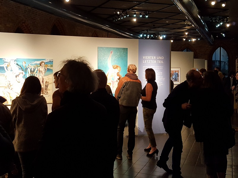 Vernissage zur Ausstellung Also sprach Zarathustra des Künstlers Thomas Bartel am 29. April 2016 im Archäologischen Landesmuseum Brandenburg